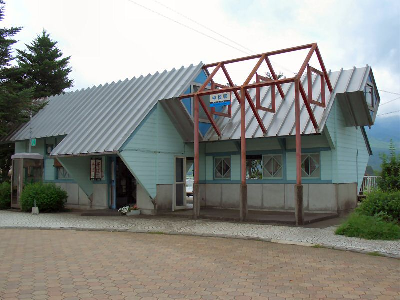 南阿蘇鉄道 中松駅 設計者 : 桂英昭 撮影者/著作者/著作権保有者 : MK Products (本人がアップロード) 撮影日 : 2005/4/23 中松駅用にアップロードした画像です。良い画像があれば別の画像に変えてください。